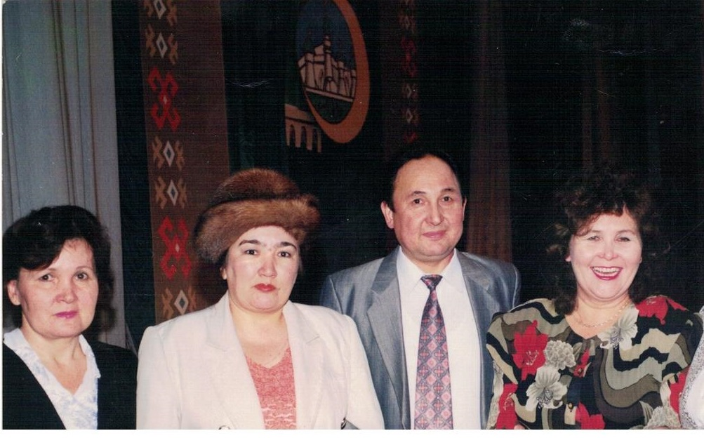 Йырсылар Ғәли Хәмзин, Роза Аҡкучукова